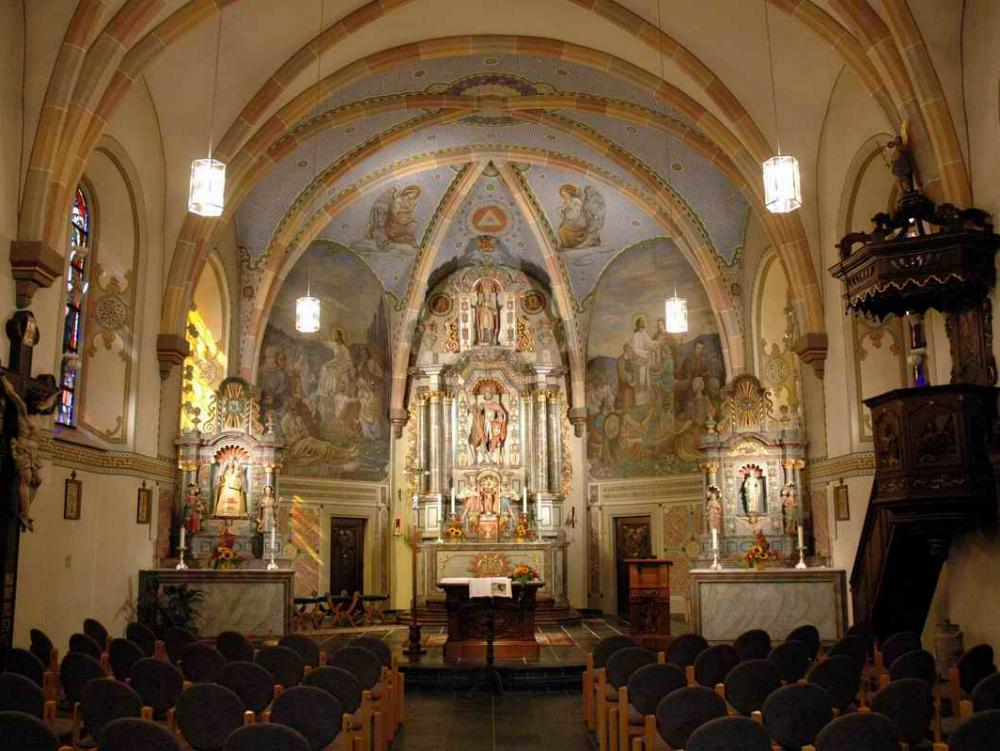 D'Kierch vun Eeschwëller, bannen. Photo vum Paschtouer Francis Erasmy.